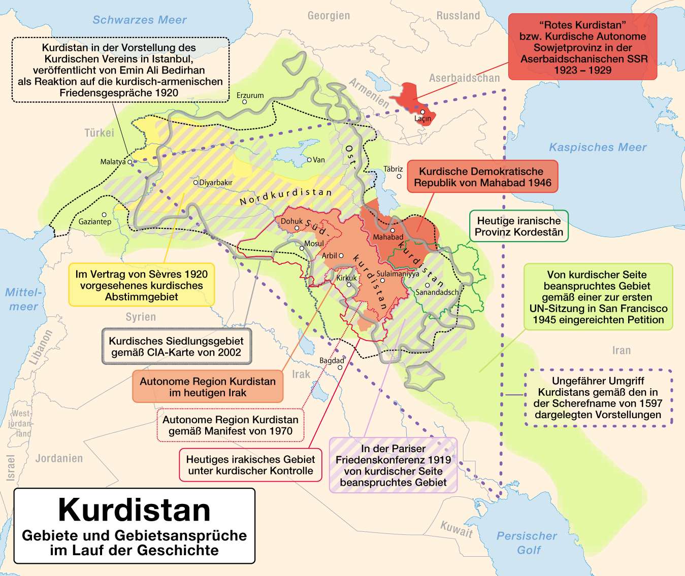 Kurdistan